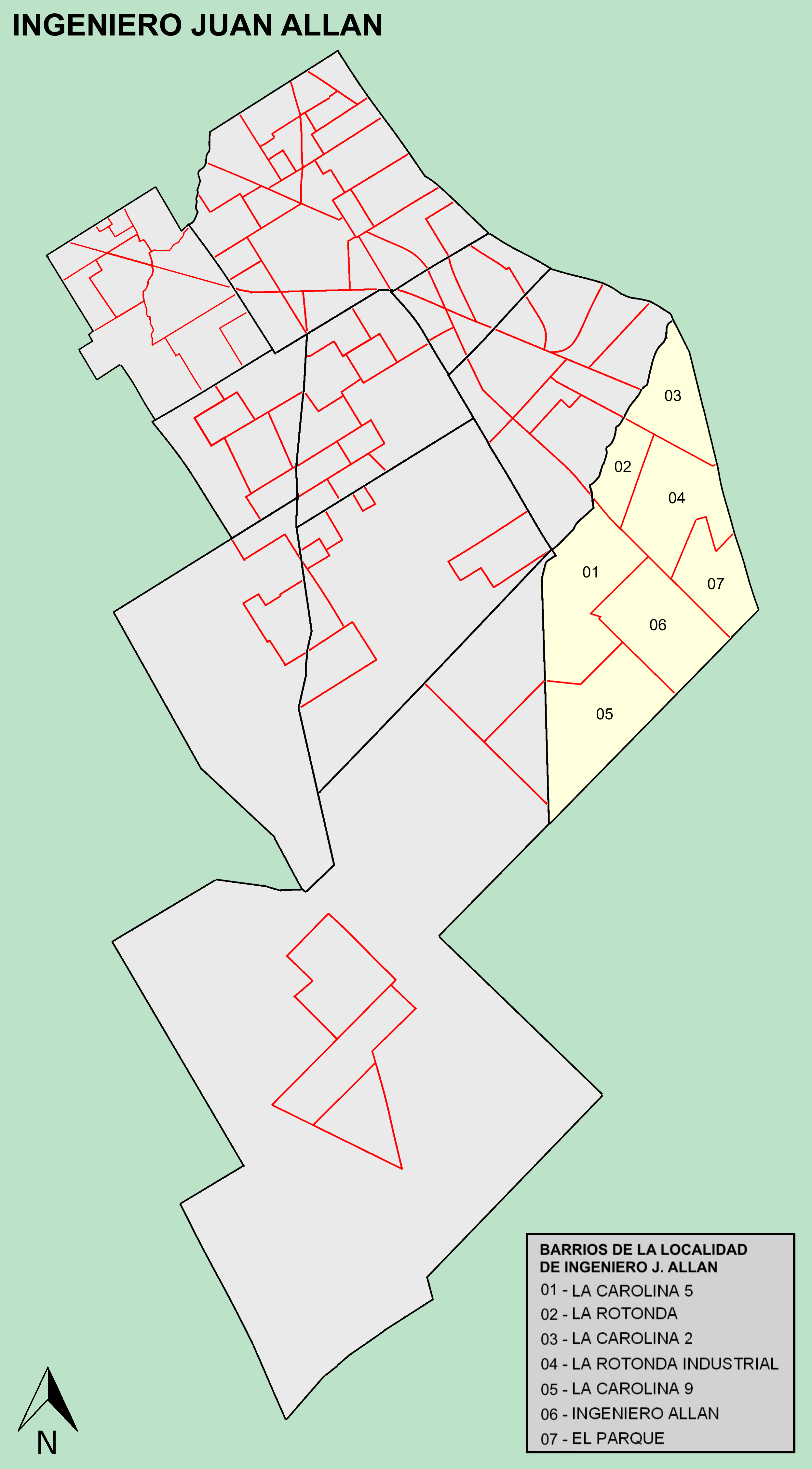 Mapa barrios de Ingeniero Allan